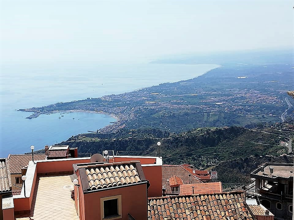 Panorama sulla Baia di Schisò di Giardini - Naxos e costa catanese.